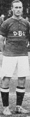 S. Nielsen in Denmark national football team at the 1912 Summer Olympics.